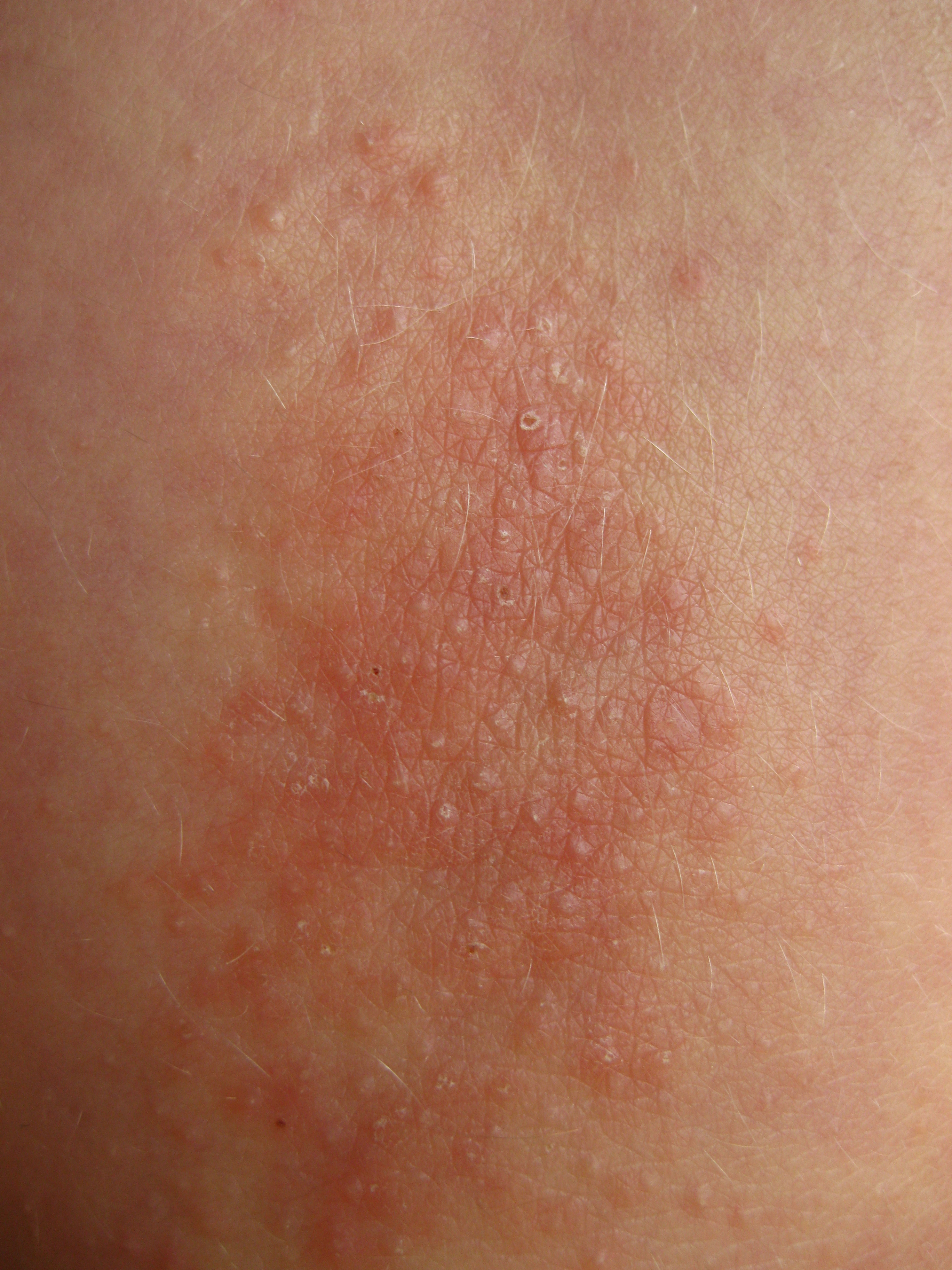 Lichen Simplex Chroncius am Ellenbogen (bestehend seit 4 Wochen)